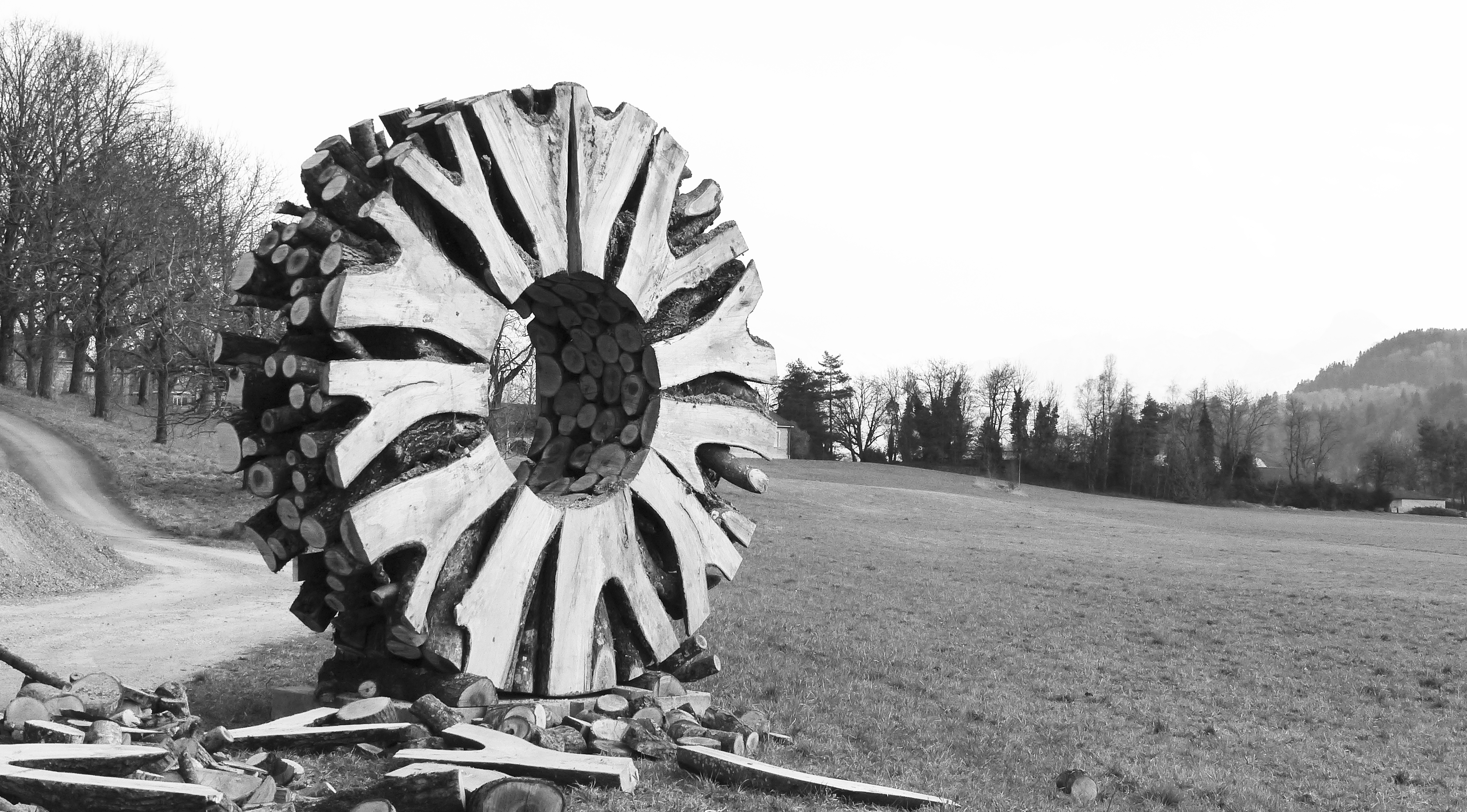 Stamm-Verzweigungen von Eschen und Walnuss-Bäumen zu einem Ring zusammengebaut. (für die 6. Triennale der Skulptur, Bad Ragaz)